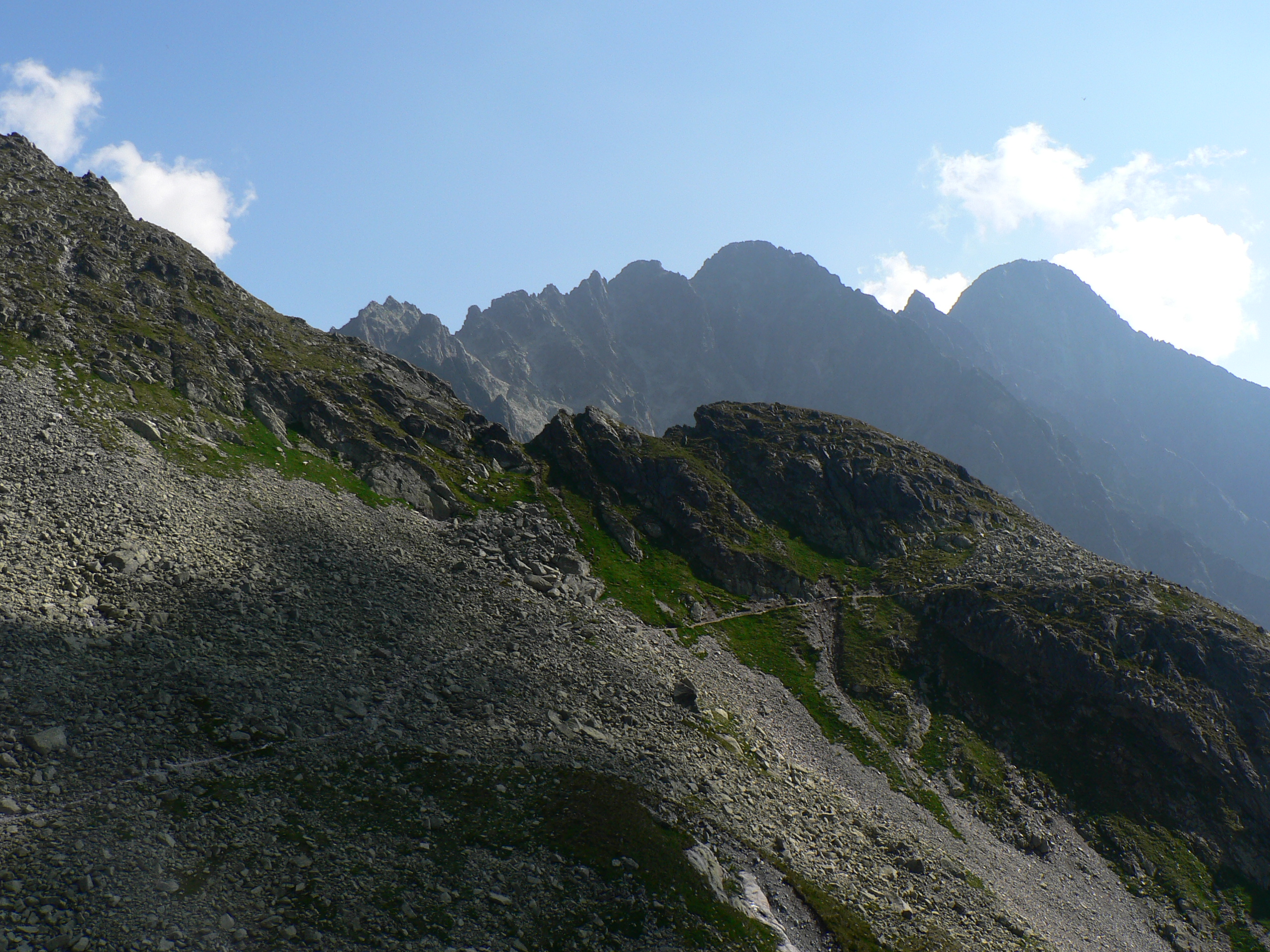 Durny Szczyt i Łomnica, poniżej Pięciostawiańska Kopa